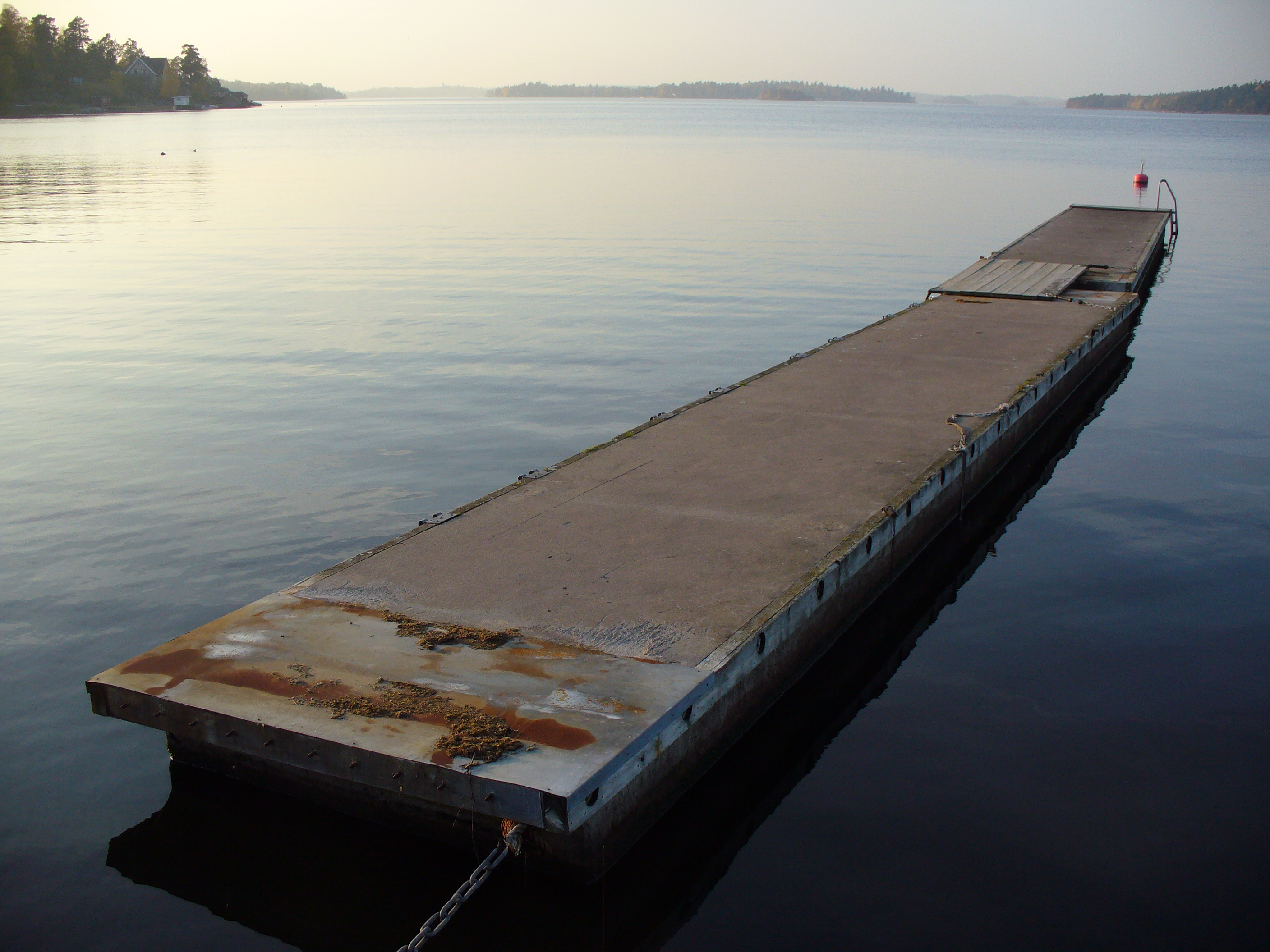 A pontoon dock at Bosön, Lidingö, Sweden